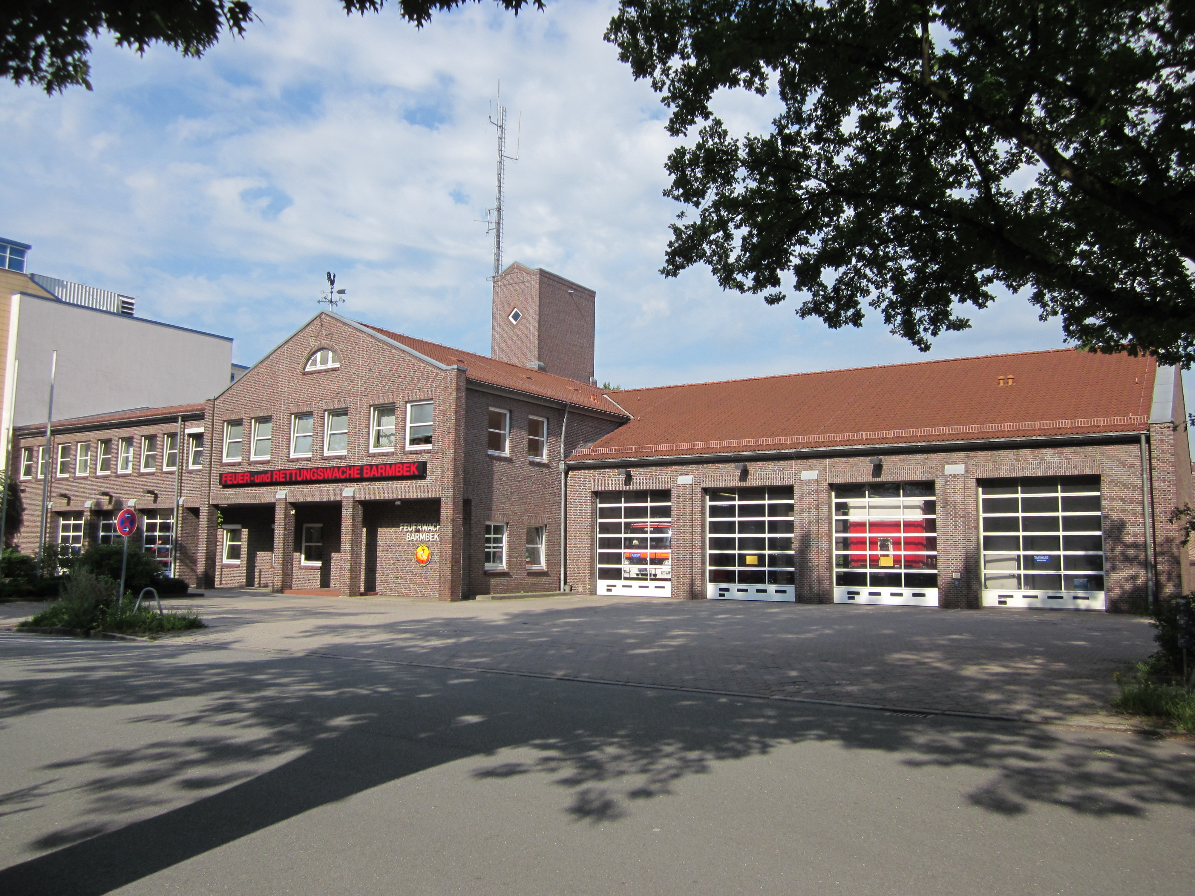 Die Feuerwache Barmbek in der Maurienstraße in Barmbek-Süd wurde Anfang der 1990er Jahre als Ersatz für die außer Dienst gestellte Wache in der Bachstraße errichtet.